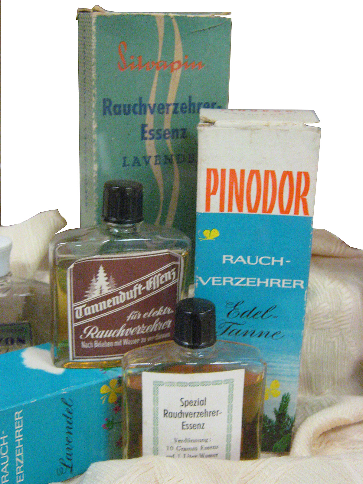 Rauchverzehreröl in einer Ausstellung des Dürener Geschichtsvereins